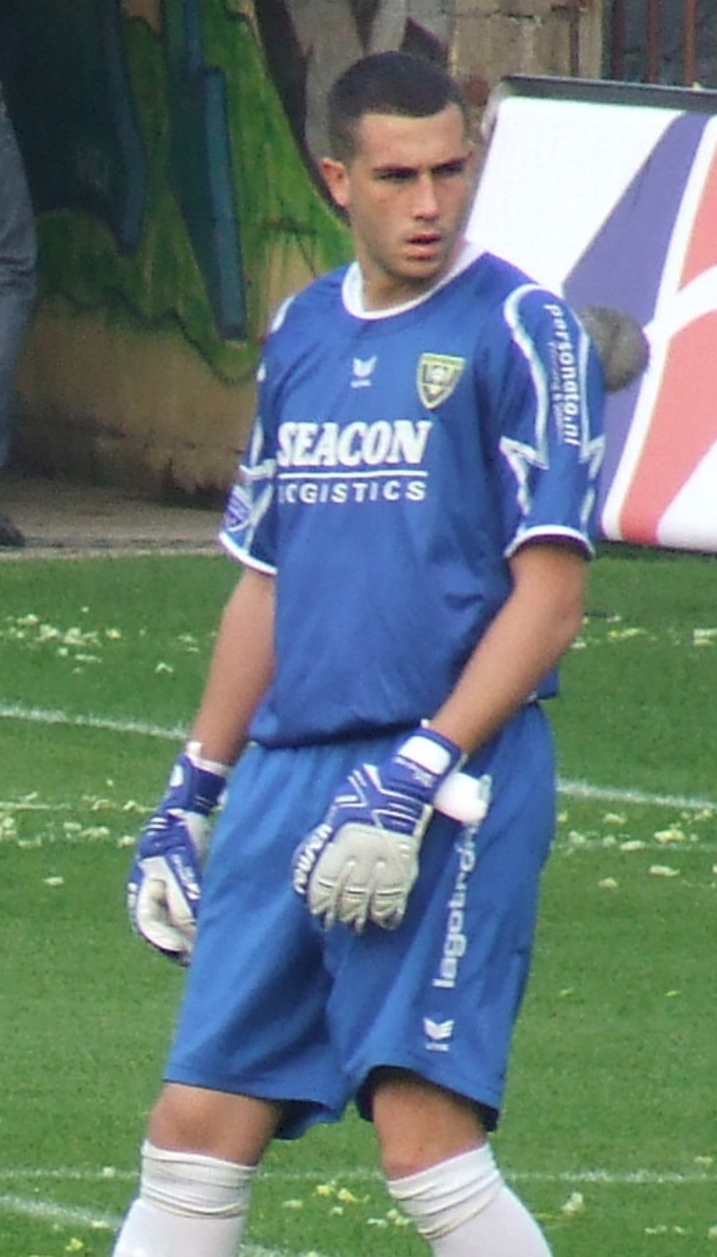 Kevin Begois 28 augustus 2007.